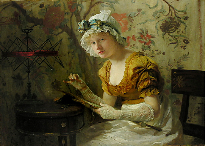 Die Stickerin